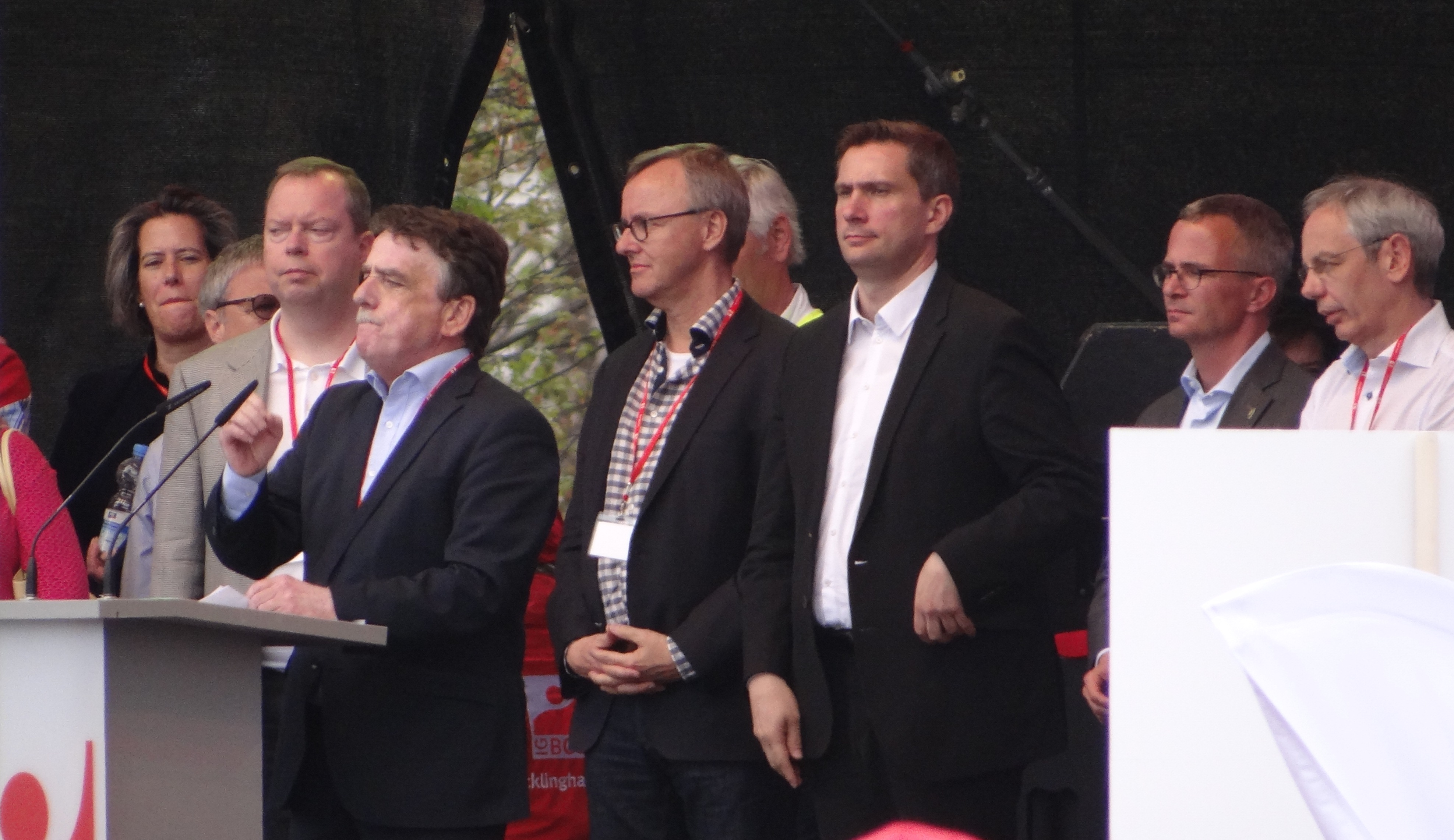 IGBCE-Demo am 25.04.2015 in Berlin. Landesminister (und RWE-Manager) auf der Bühne: Michael Groschek, Bau- und Verkehrsminister in NRW am Rednerpult Peter Terium und Matthias Hartung, RWE, links und rechts neben Groschek Martin Dulig, Wirtschaftsminister in Sachsen Albrecht Gerber, Wirtschaftsminister in Brandenburg Michael Vassiliadis, Vorsitzender IG BCE